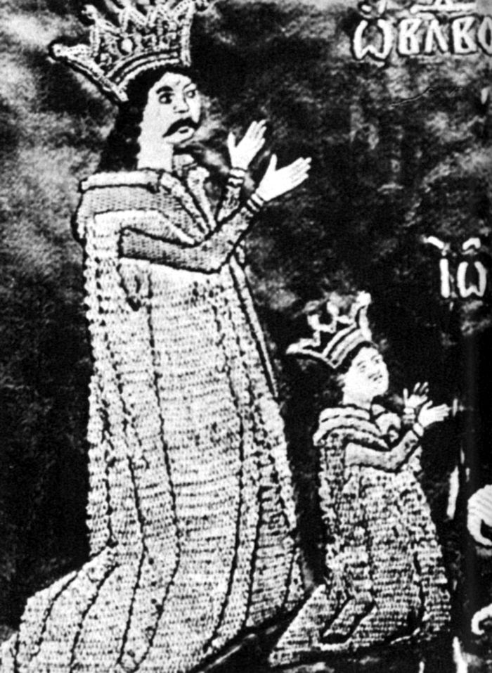 Vlad Vintilă de la Slatina